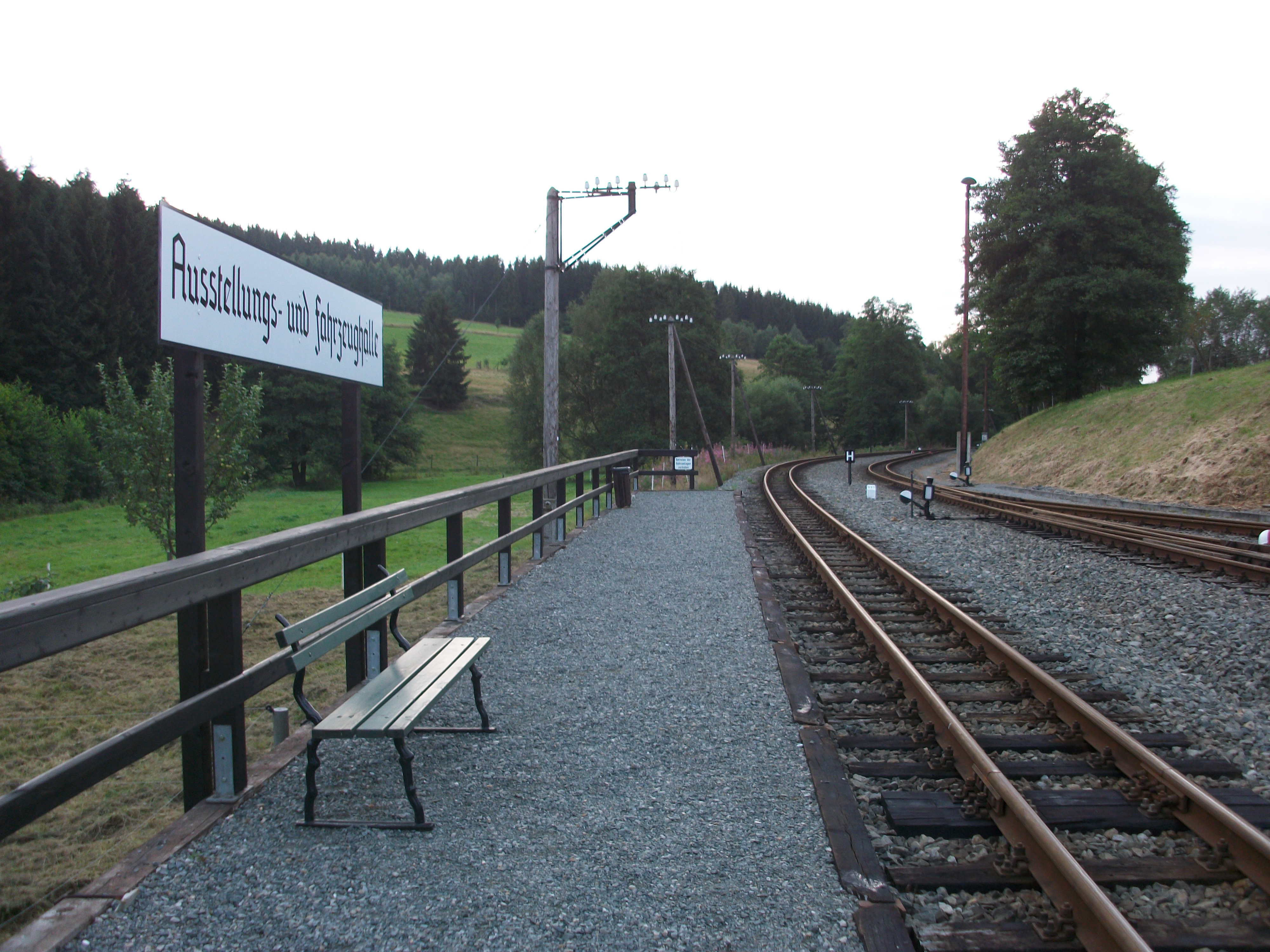 Haltepunkt Ausstellungs- und Fahrzeughalle (2016)